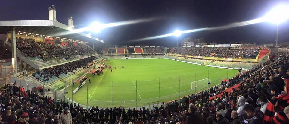 BENVENUTI ALL' INFERNO